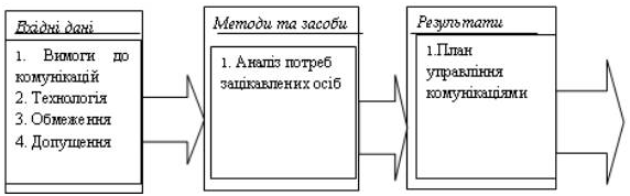 Логічна схема планування інформаційного зв'язку